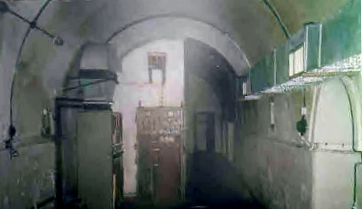 Galleria di Purgessimo, Sezione del Fante di Cividale del Friuli